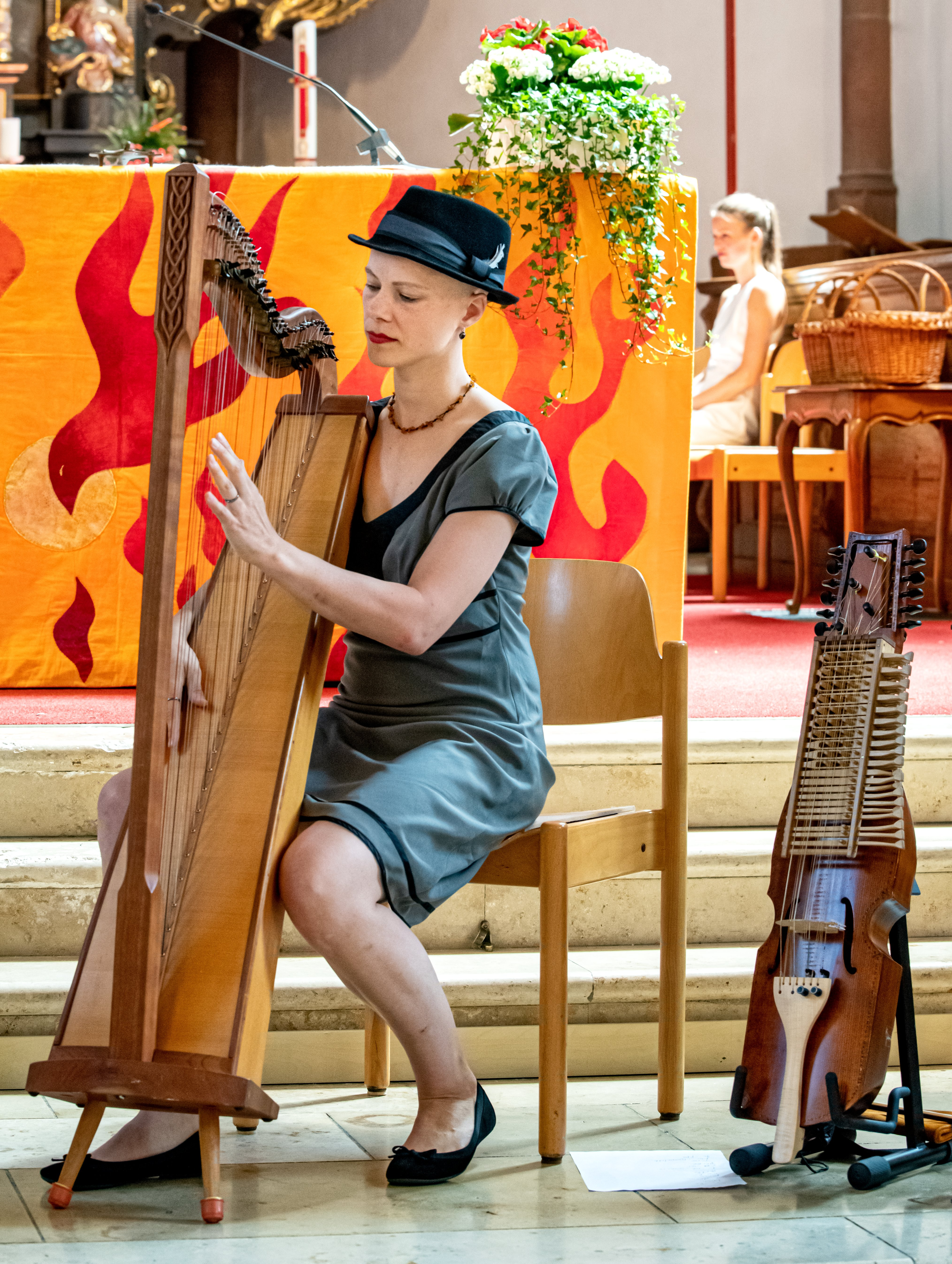 Bilder vom Black Forest Voices Festival in Kirchzarten. Ein Festival mit Workshops für Chöre und A Capella Gesang vom 27. 6. 2019 zum 30.06. 2019 Das Konzert in der Kirche St. Gallus Kirchzarten. Sie spielt auf einer selbstgebauten "böhmische Hakenharfe".